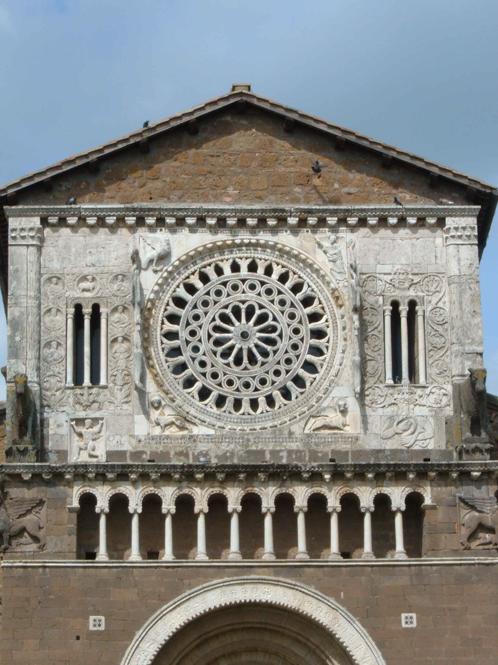 Basilica di San Pietro in Tuscania, provincia di Viterbo.